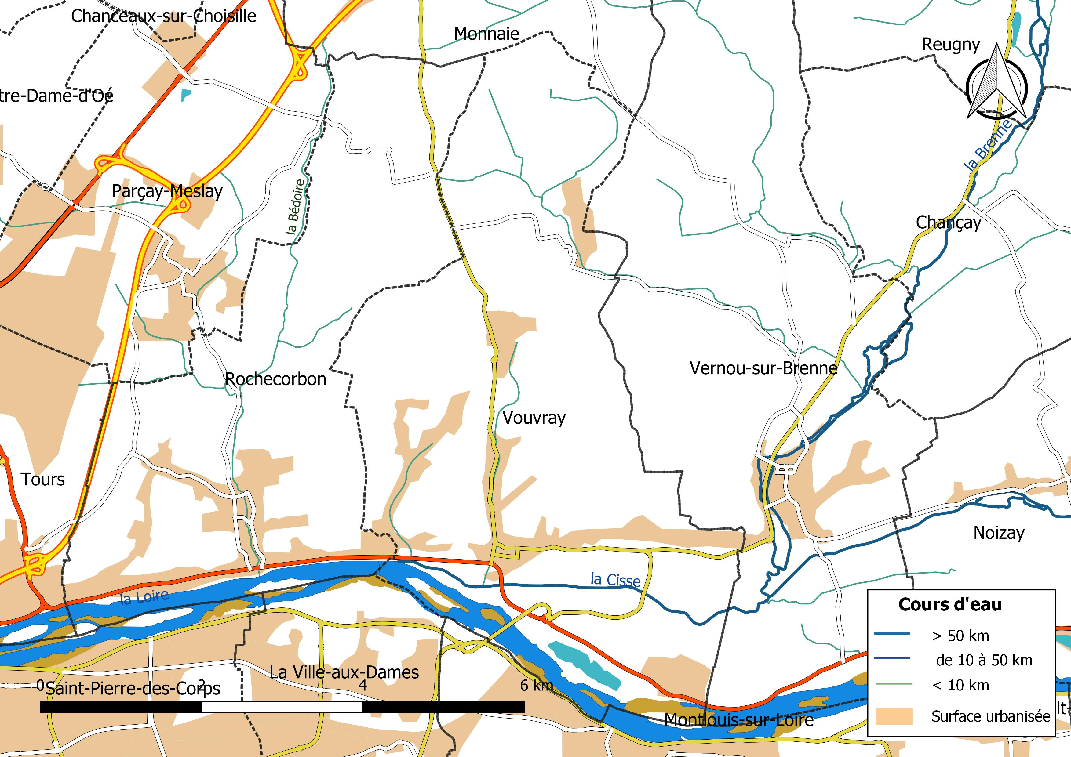 Carte du réseau hydrographique de la commune de Vouvray (France).